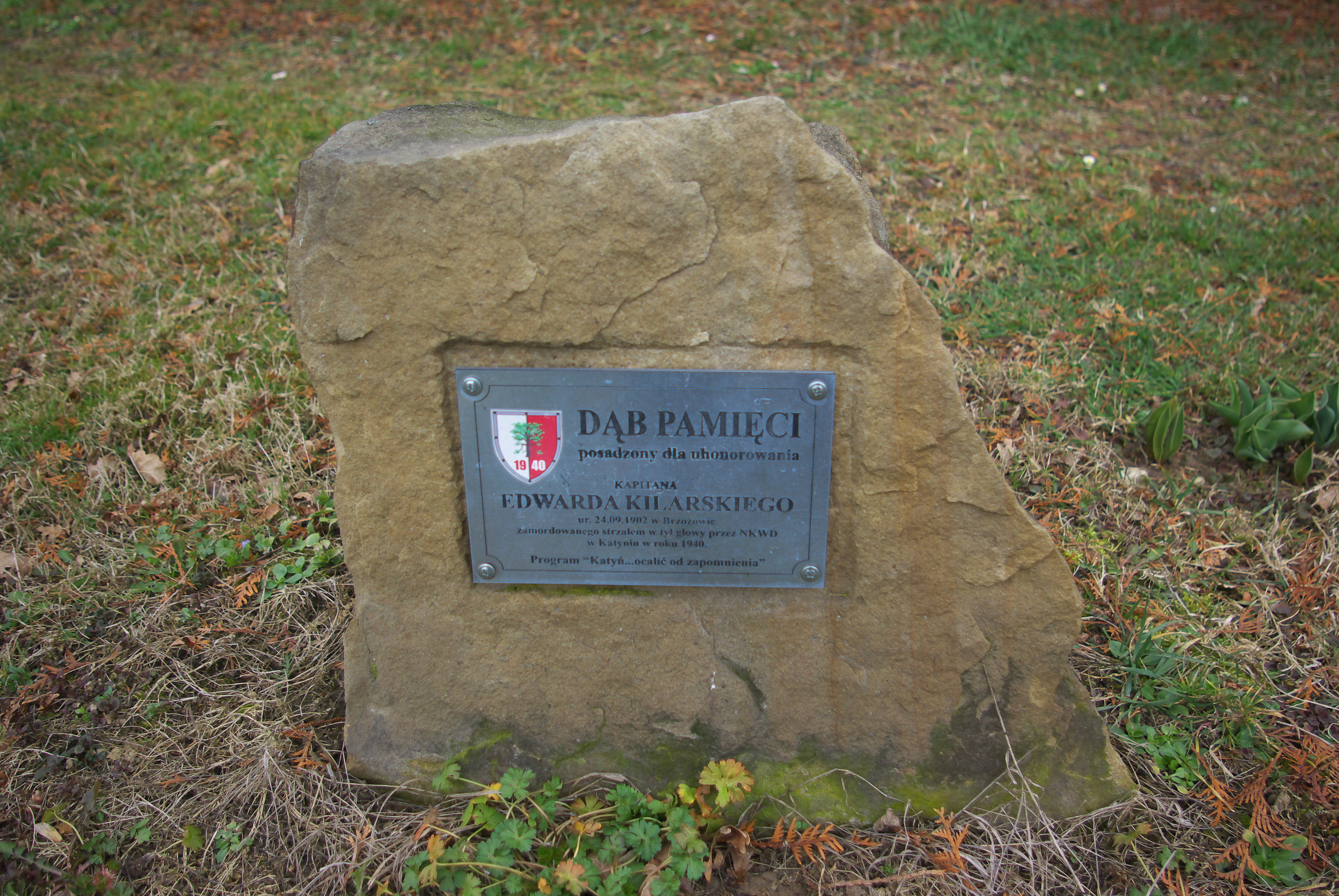 Dąb Pamięci honorujący Edwarda Kilarskiego przy Powiatowej Stacji Sanitarno-Epidemiologicznej w Brzozowie przy ulicy Moniuszki 17